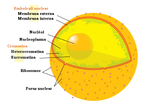 Diagrama esquemàtic d'un nucli cel·lular.